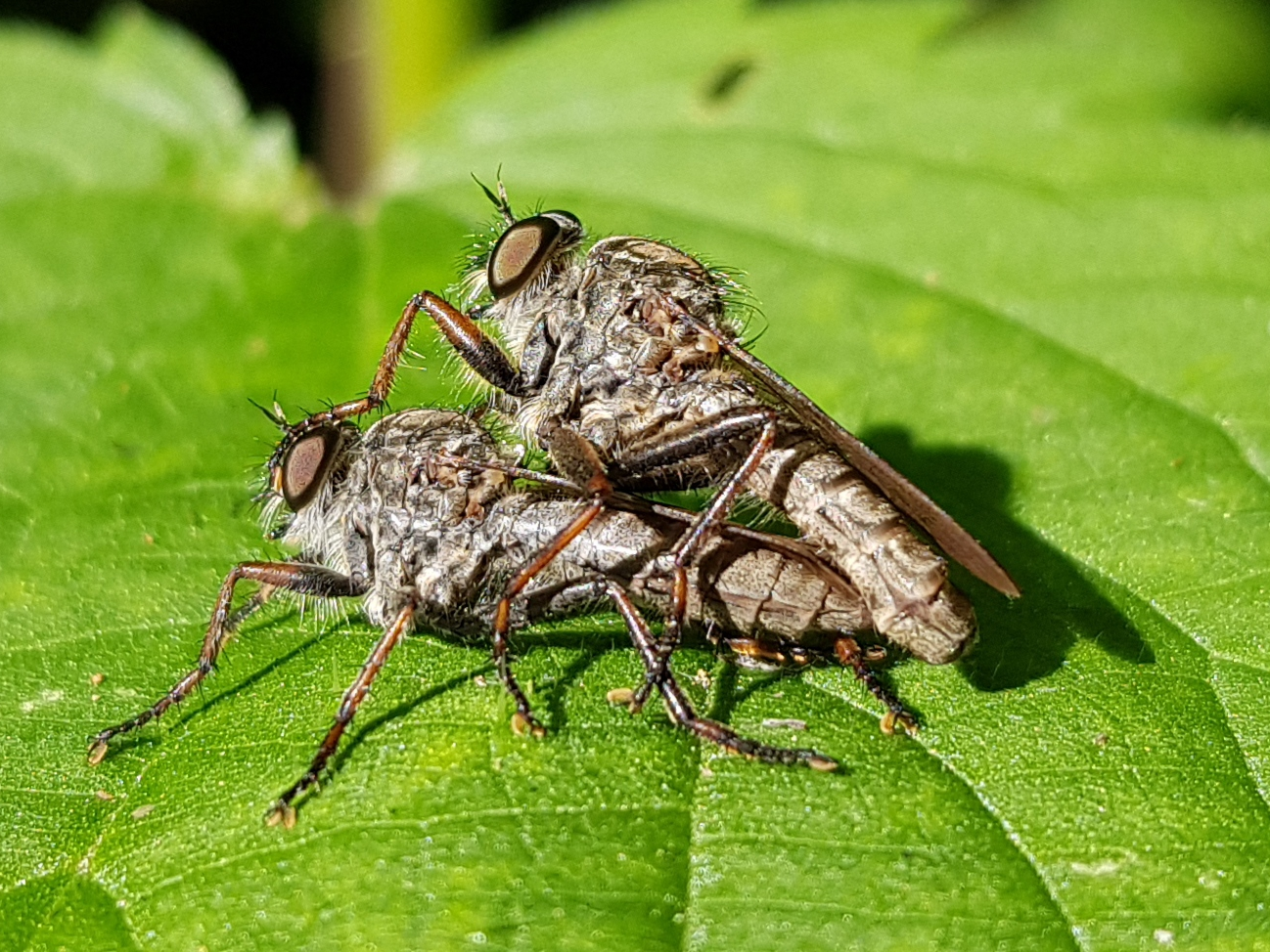 Asilidae (Diptère)